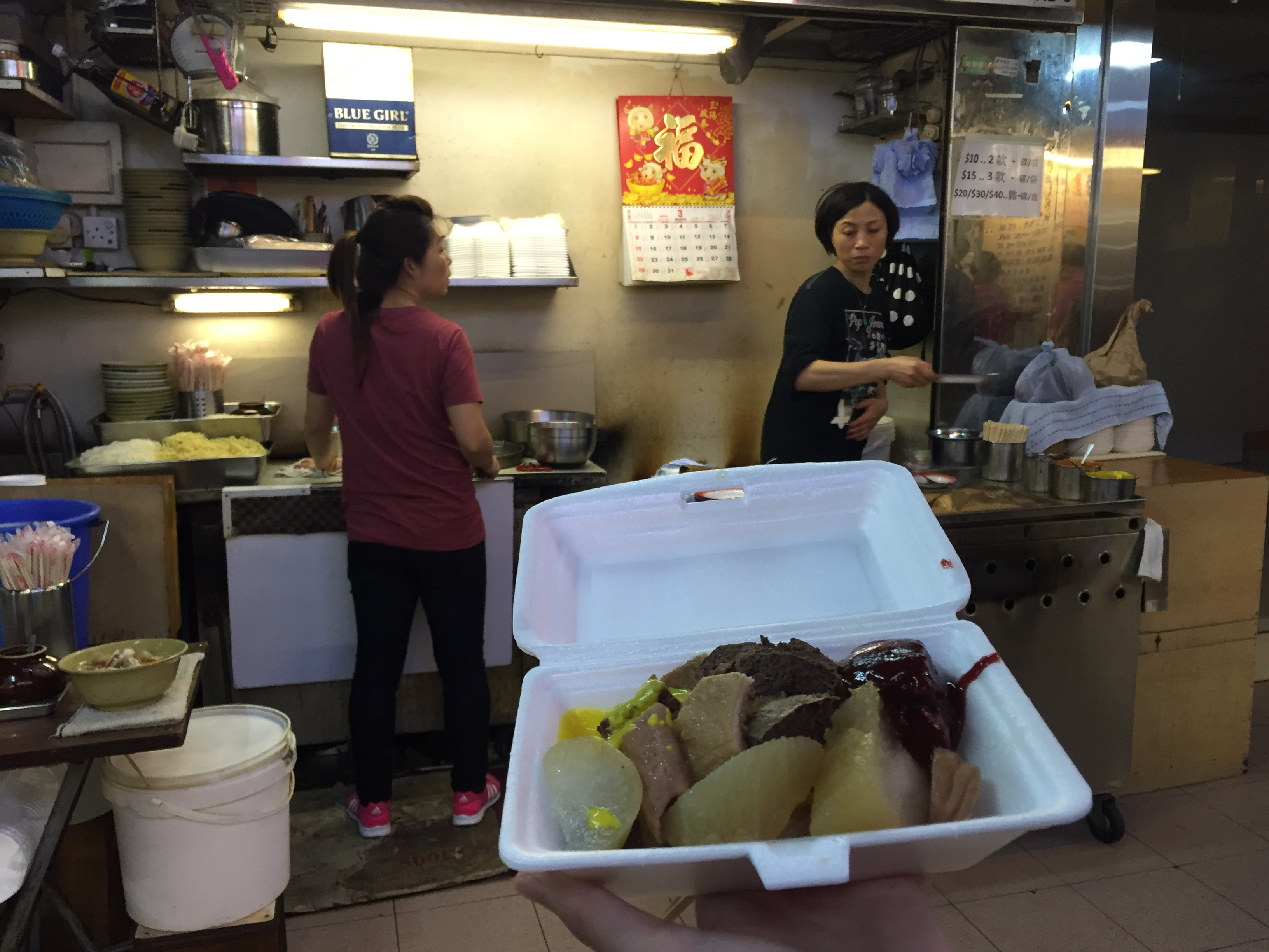 Offal@Tai On Building